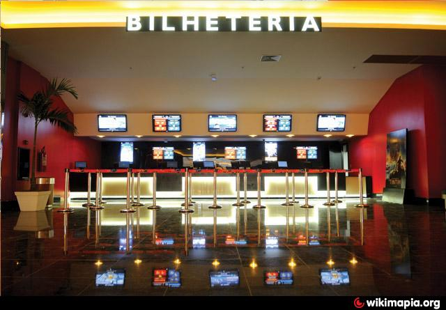 Bilheteria do Multiplex Guadalupe Shopping do Rio de Janeiro, RJ